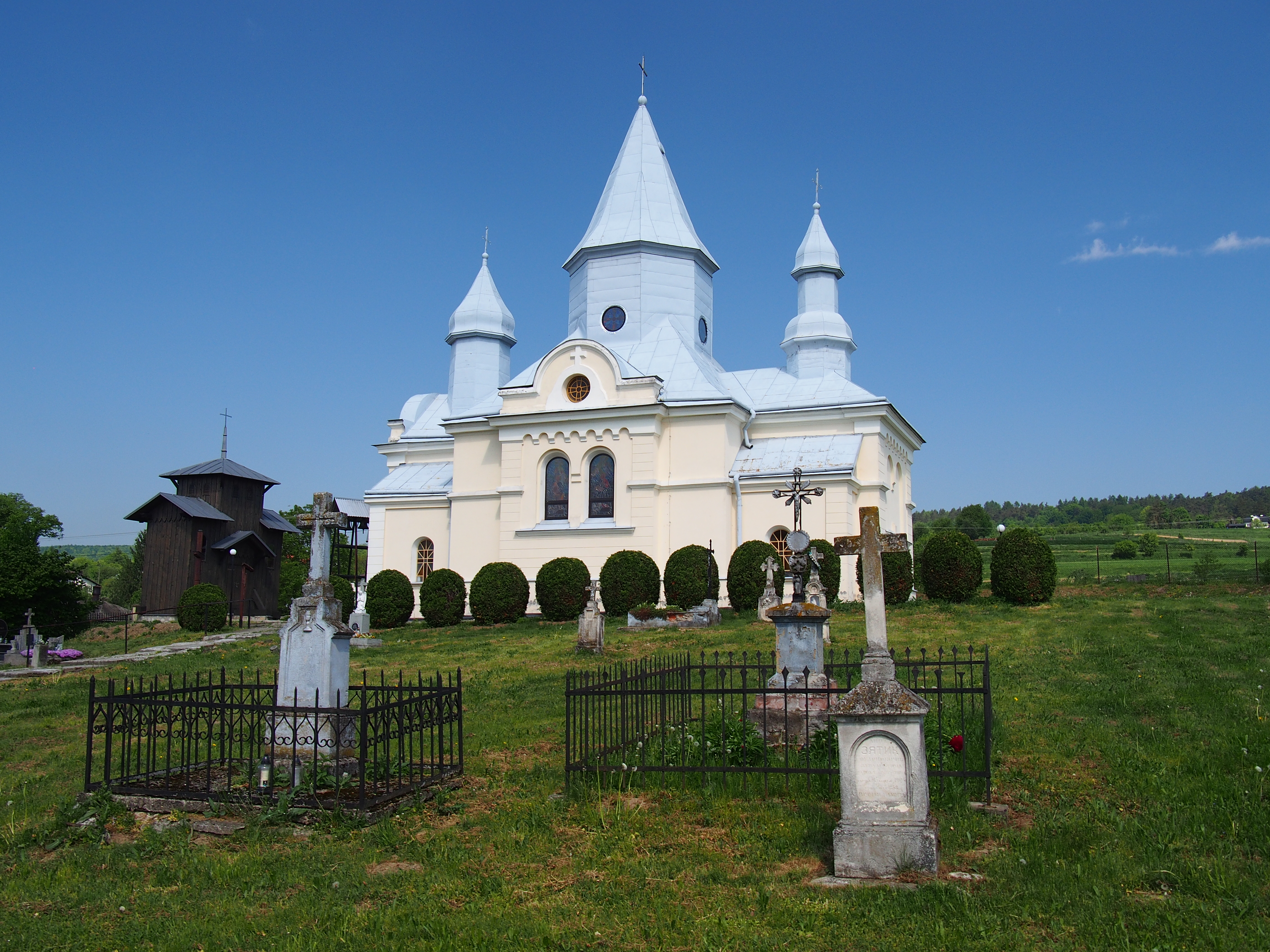 Wapowce - pierwotnie cerkiew greckokatolicka, obecnie kościół rzymskokatolicki pw. św. Mikołaja, 1876